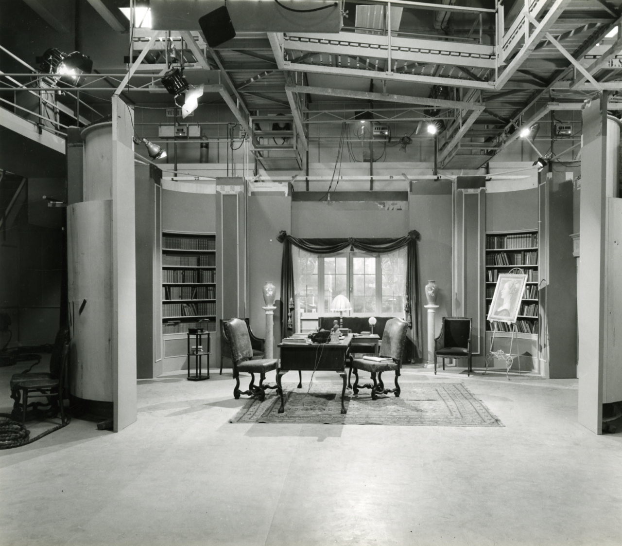 Servizio fotografico : Roma, 1958 / Paolo Monti. - Stampe: 3 : Positivo b/n, gelatina bromuro d'argento/ carta, 24x30. - ((Sul coperchio della scatola iscrizione didascalica manoscritta a pennarello nero: "Scultura". - Occasione: Documentazione per la pubblicazione: Sinisgalli Leonardo (a cura di), "Il centro televisivo di Roma", Torino, ERI, 1958. - Fonte: Monografia di Sinisgalli Leonardo (a cura di): Il centro televisivo di Roma, Torino, ERI (1958)